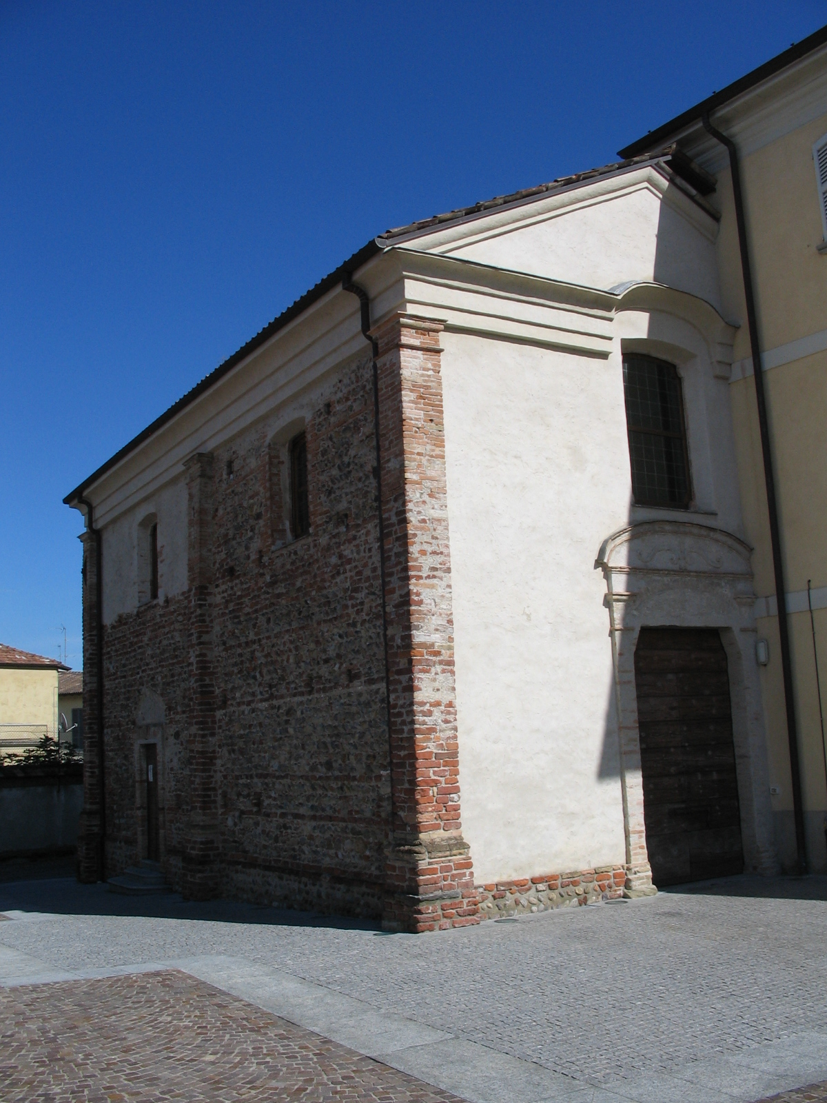 Basilica Autarena di Fara Gera d'Adda, nel comune di Fara Gera d'Adda.